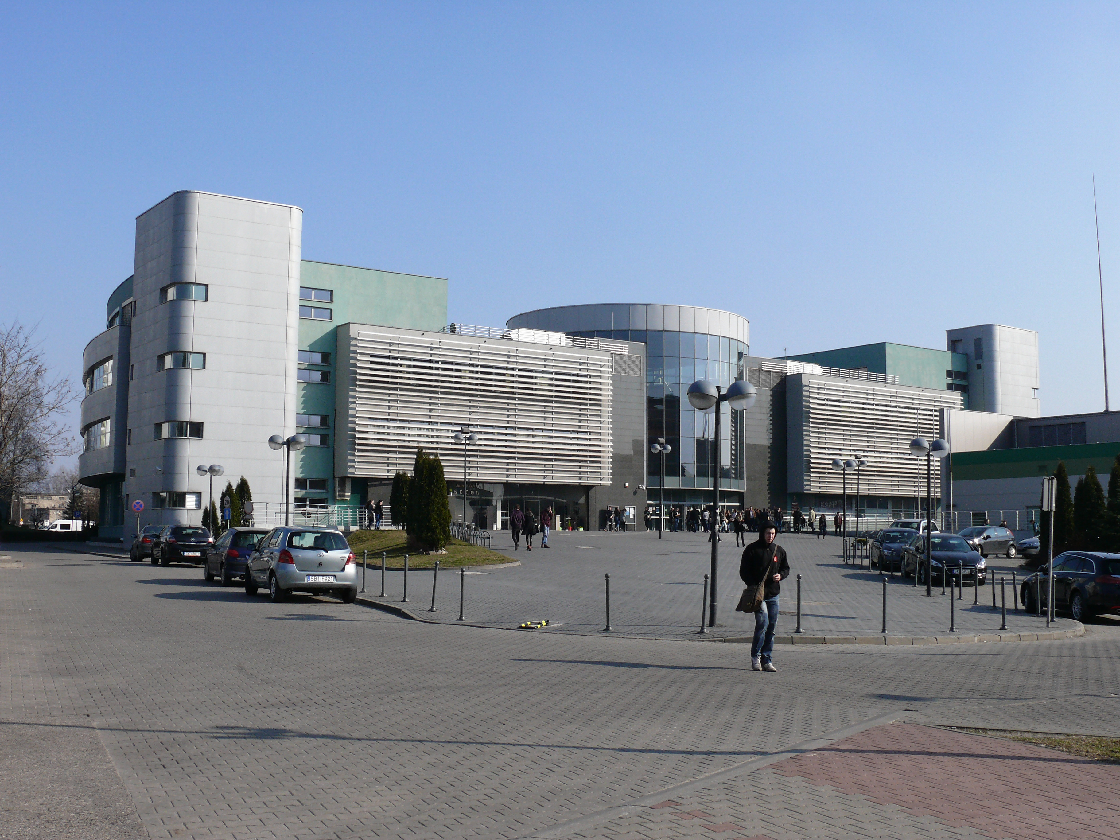 Das Gebäude der juristischen Fakultät auf dem Uni-Campus in Kattowitz.